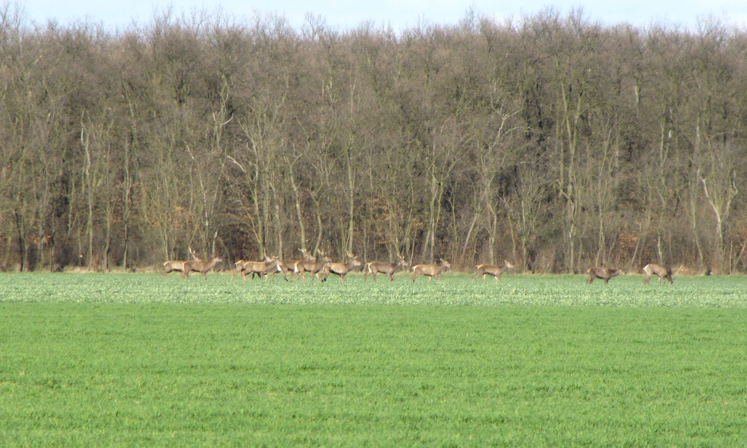 Jellegzetes kép a Kemeneshátról Pápocnál